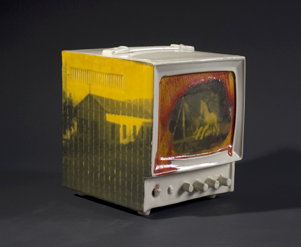 מתוך הסדרה ערוץ אלדווארה